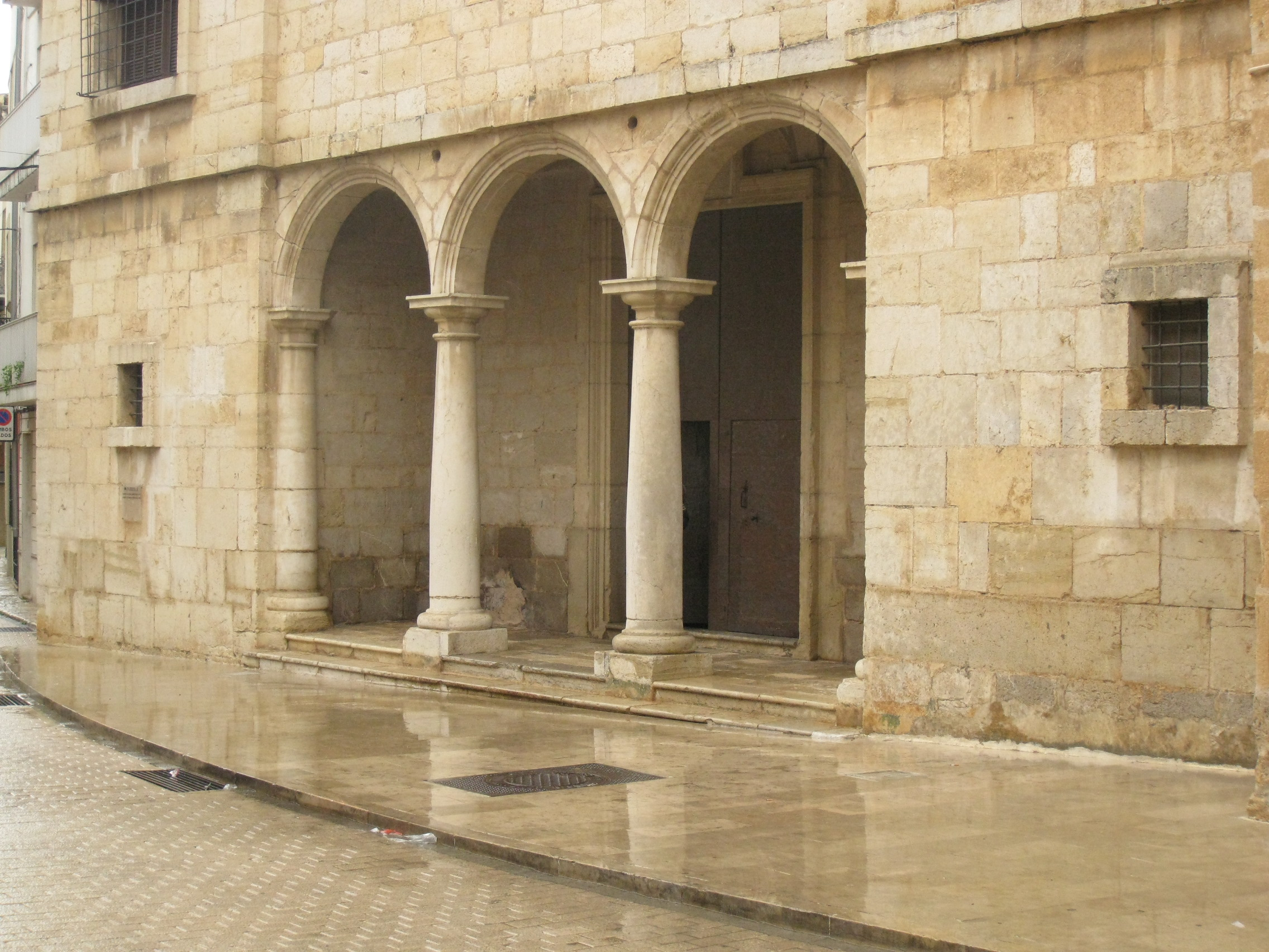 Monestir de Santa Anna (Sant Mateu) 03.100-001.